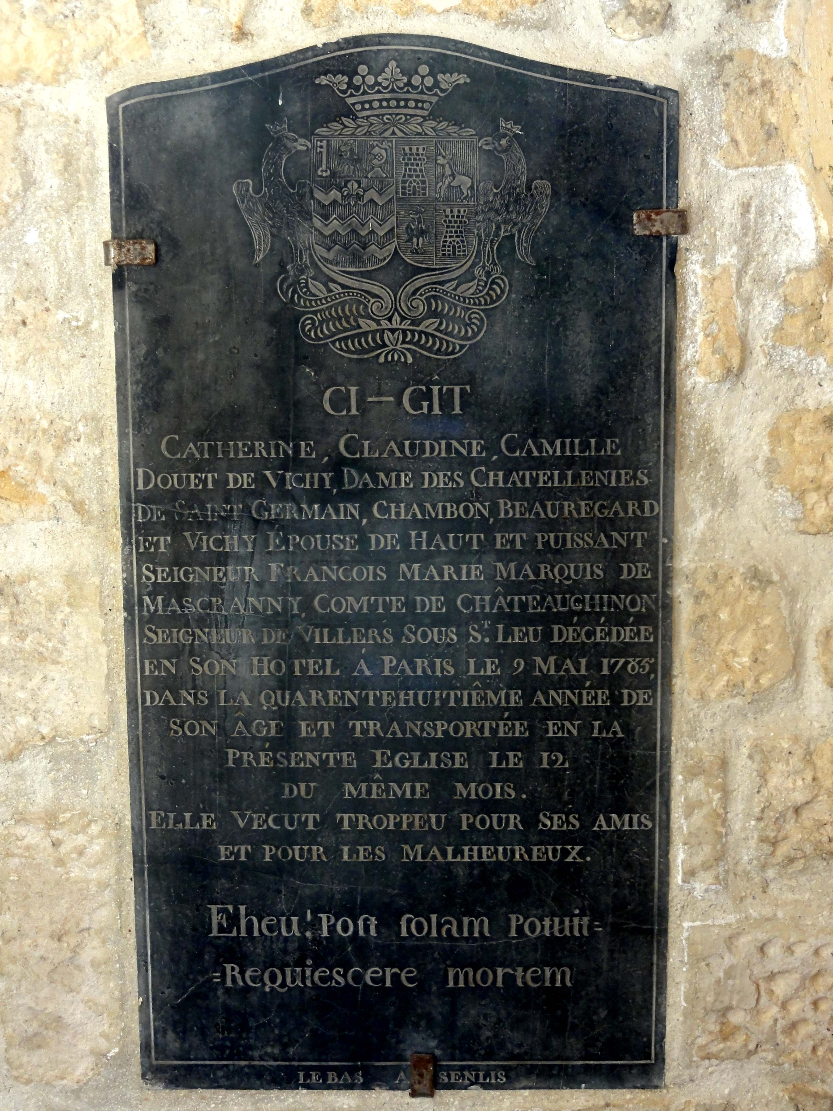 Plaque funéraire de Mme de Mascranny, morte à Paris le 9 mai 1785.